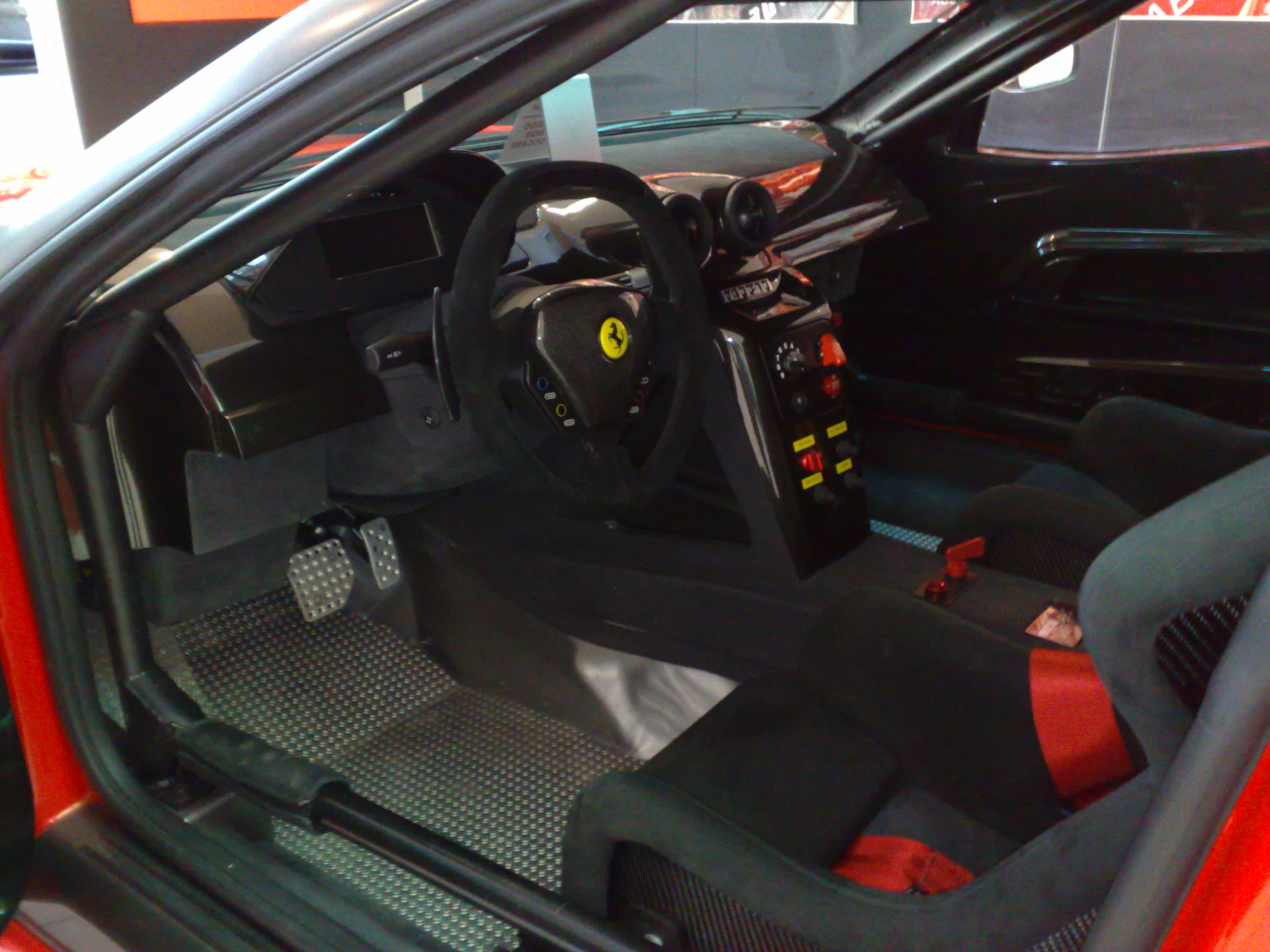 Ferrari 599XX, Galleria Ferrari, Maranello